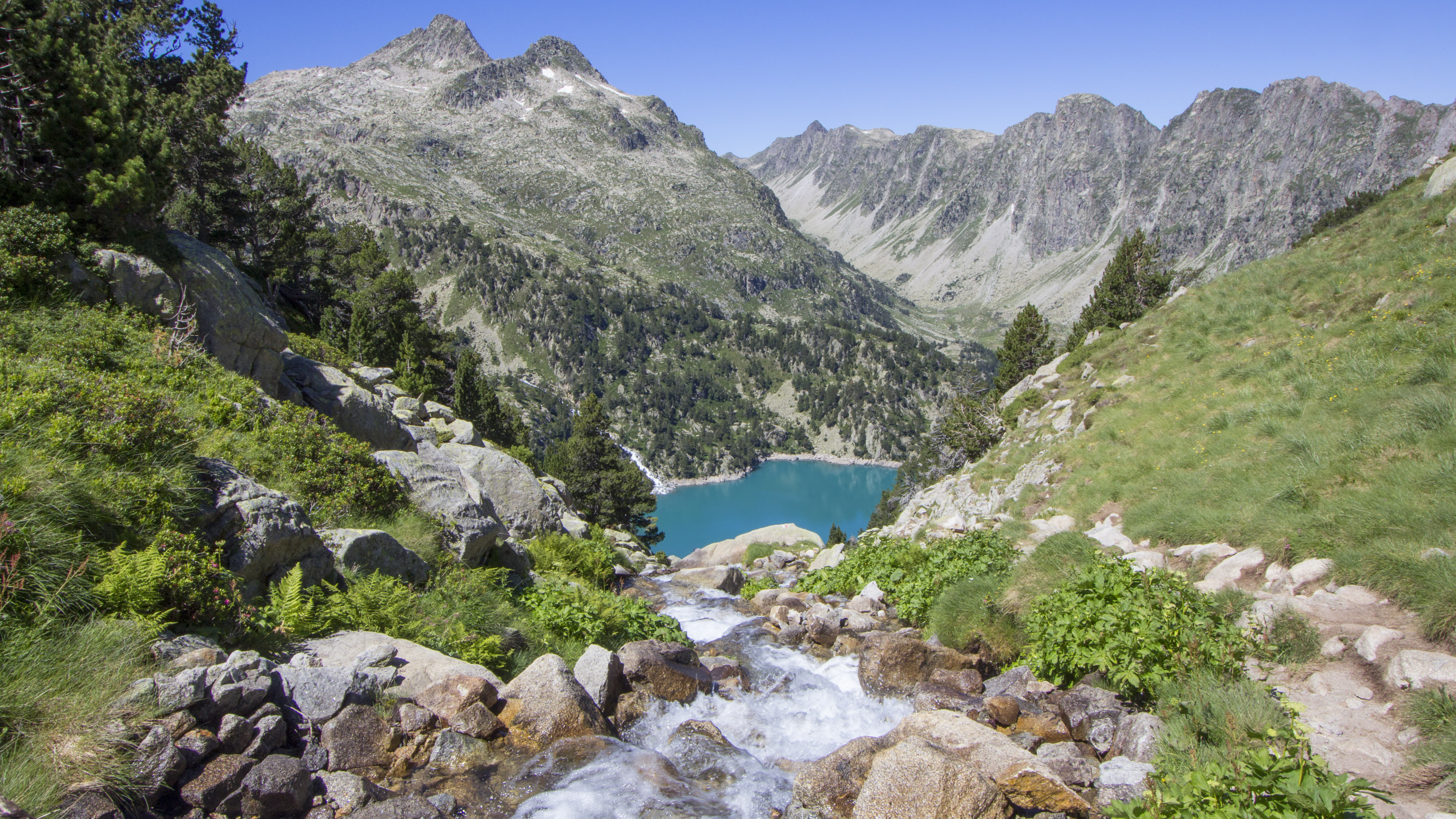 Era Restanca des del planells del Cap del Port (Vall d'Aran)